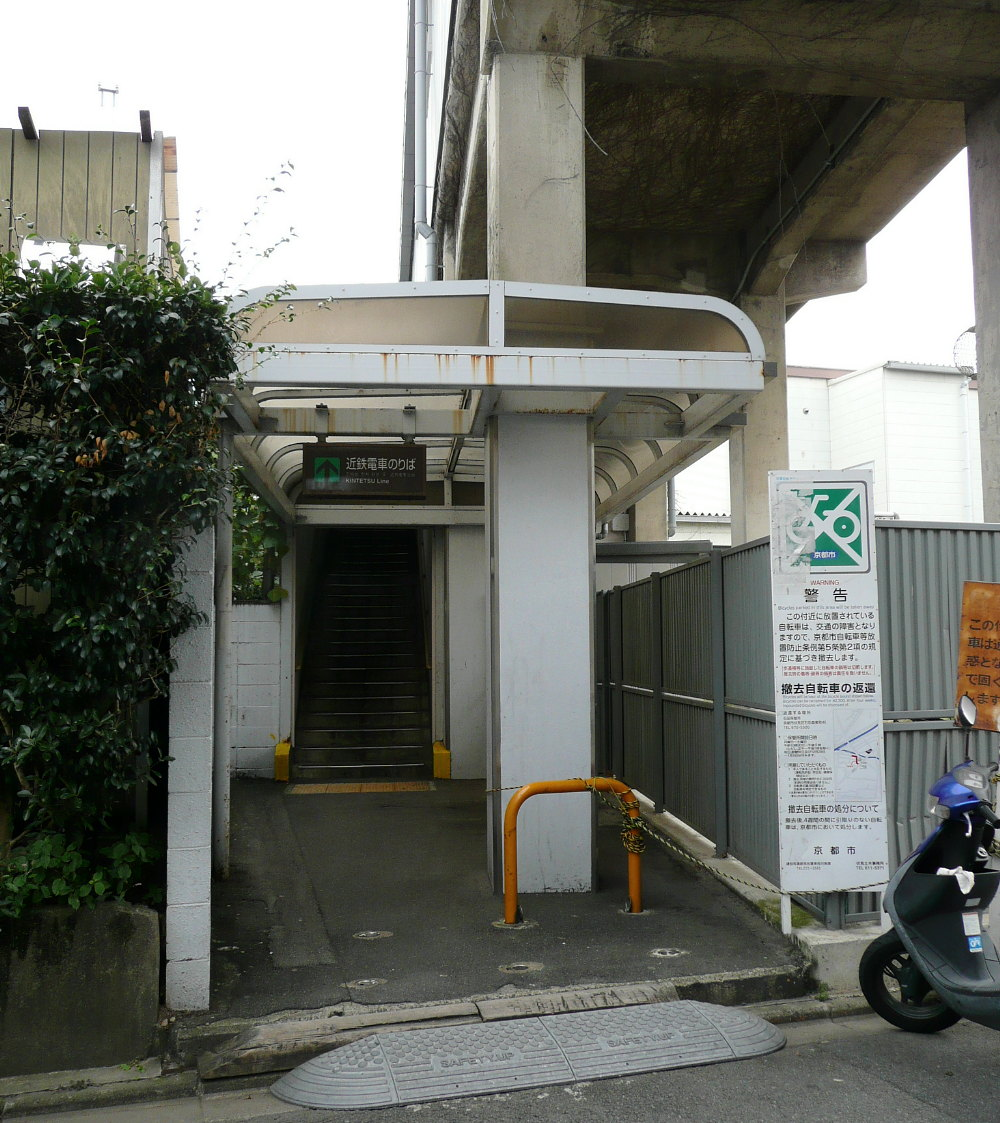 近畿日本鉄道京都線近鉄丹波橋駅中央口（京阪線丹波橋駅4番出入口の向かい側）